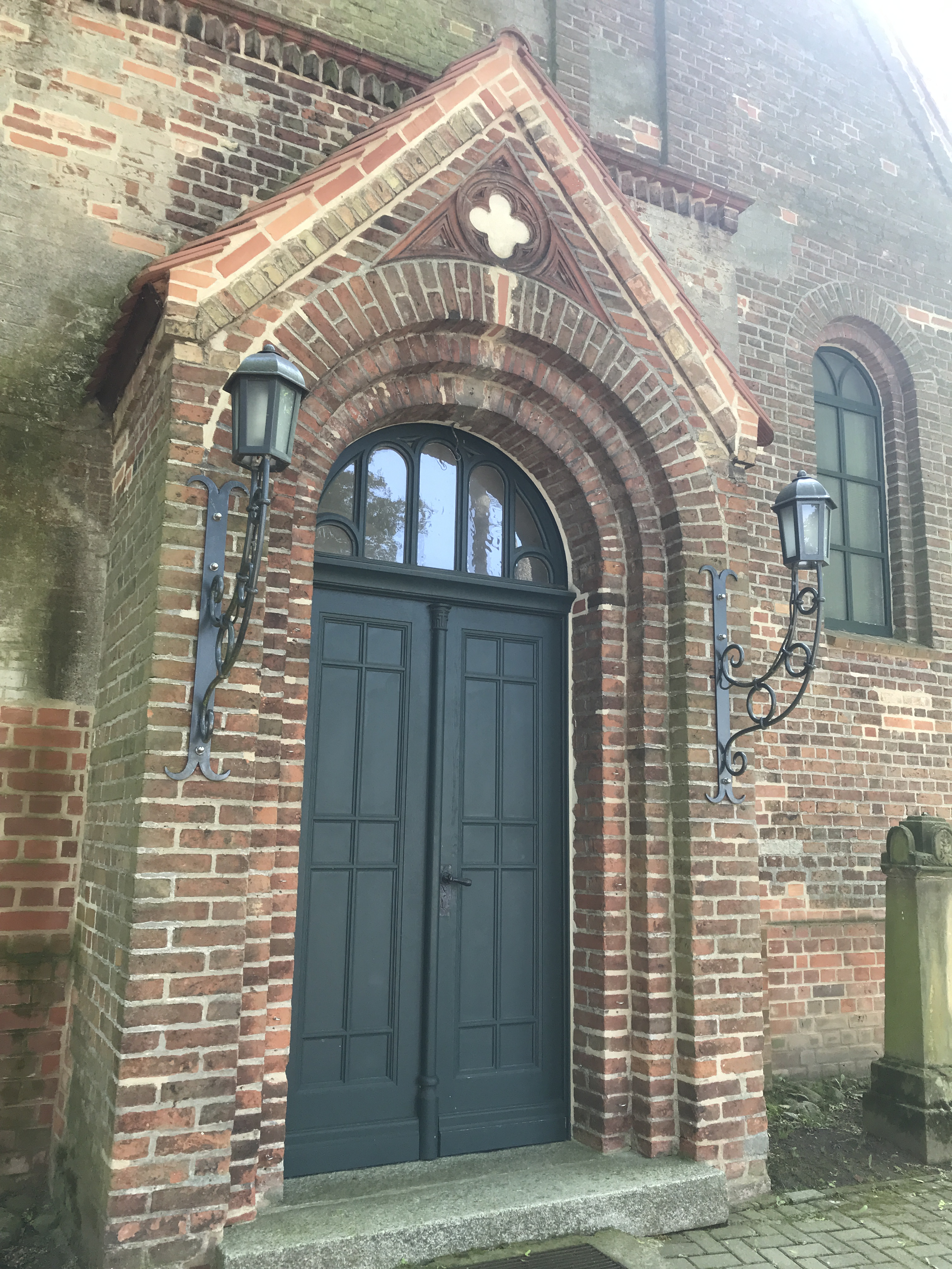 Die Dorfkirche Jacobsdorf in der gleichnamigen Gemeinde im Landkreis Oder-Spree ist eine Feldsteinkirche aus dem 13. Jahrhundert. Im Turm hängen zwei Glocken aus dem 14. Jahrhundert sowie aus dem Jahr 1580.